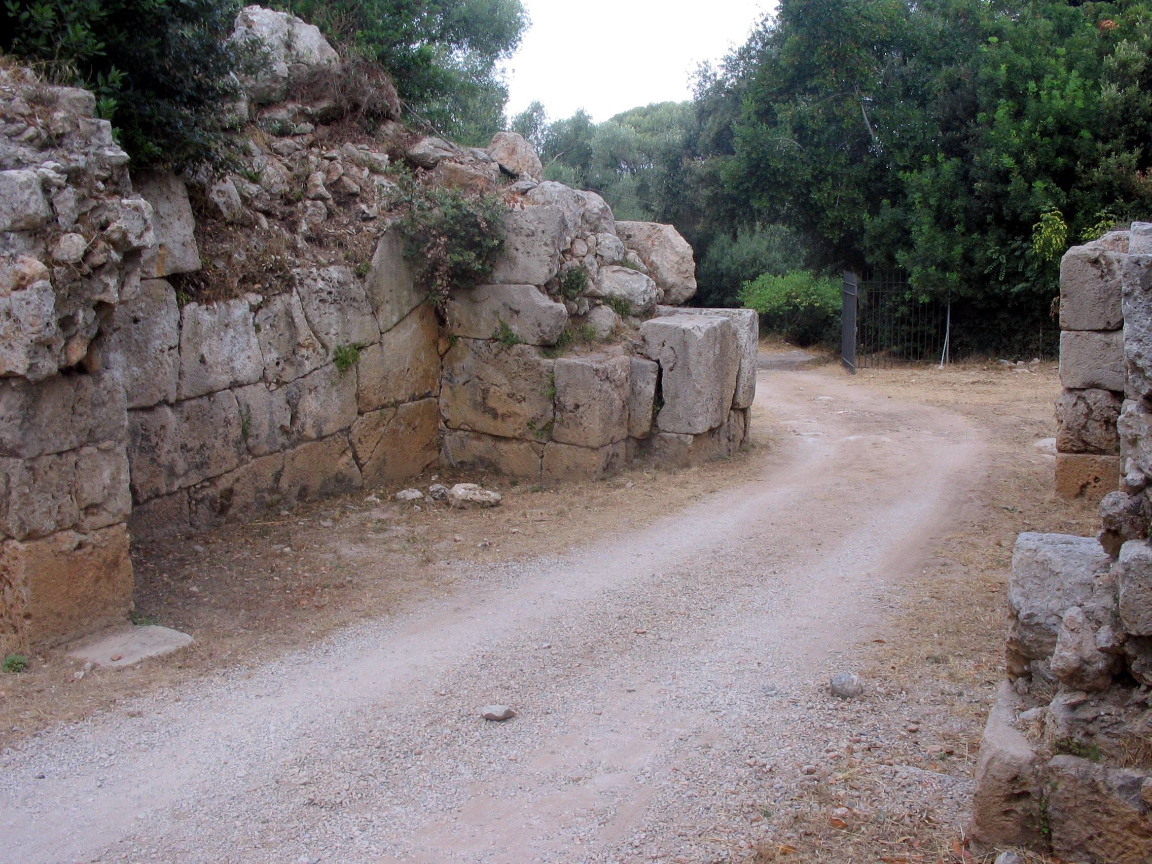 Cosa, Ansedonia, Orbetello, Toscana, Italia